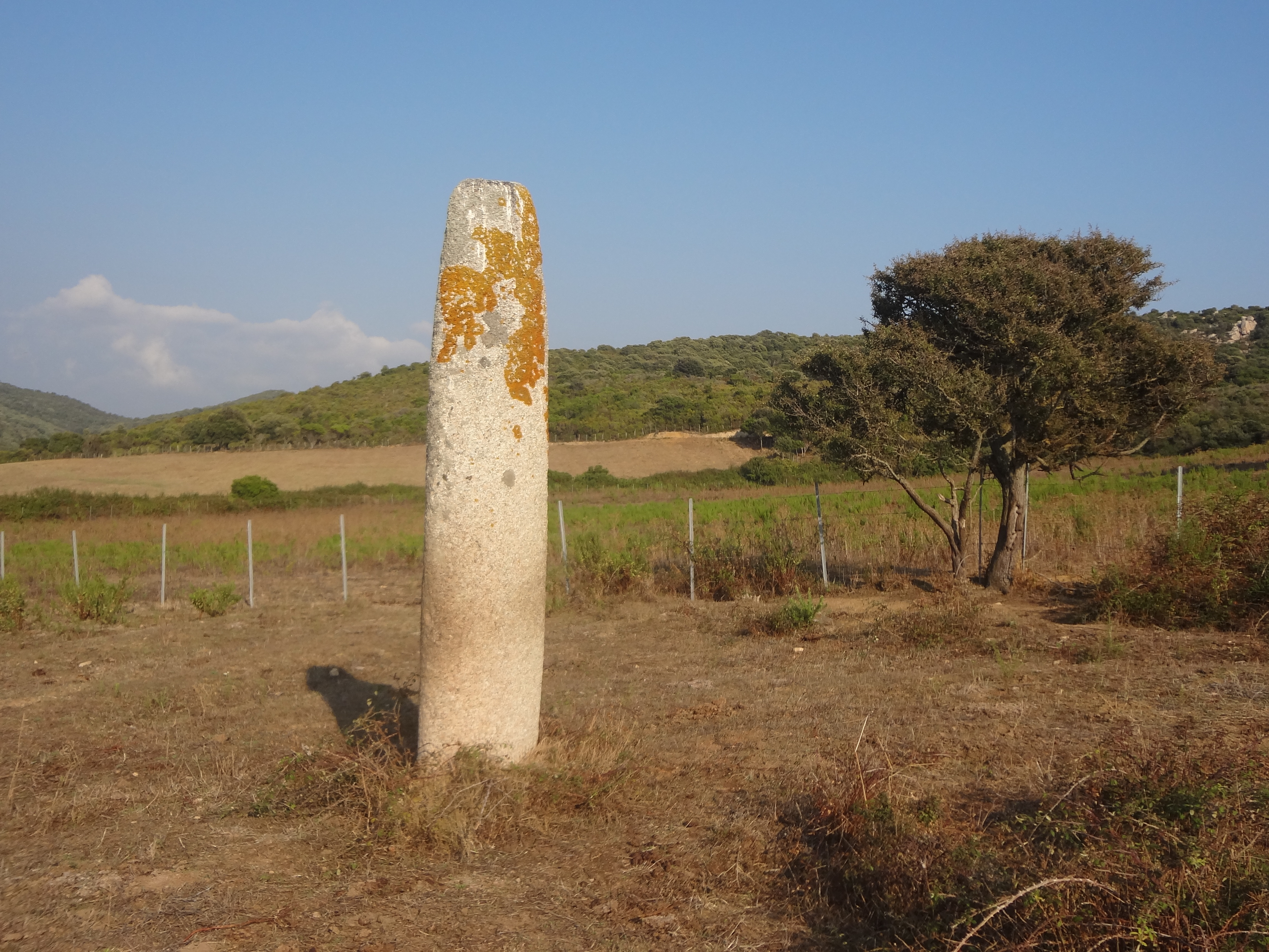 Menhir de Vaccil Vecchiu, Grossa, Corse (Classé, 1862) .